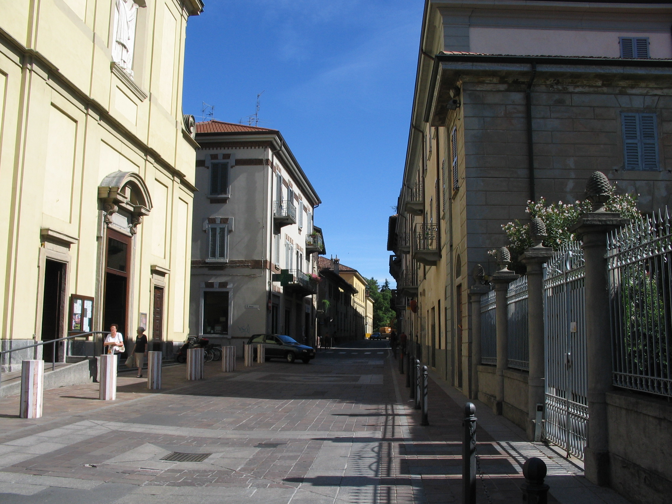 Osnago, panorama.